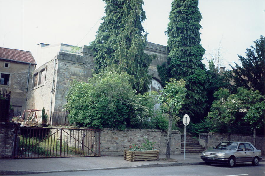 Ancien bâtiment d'embouteillage des eaux de Bains-les-Bains